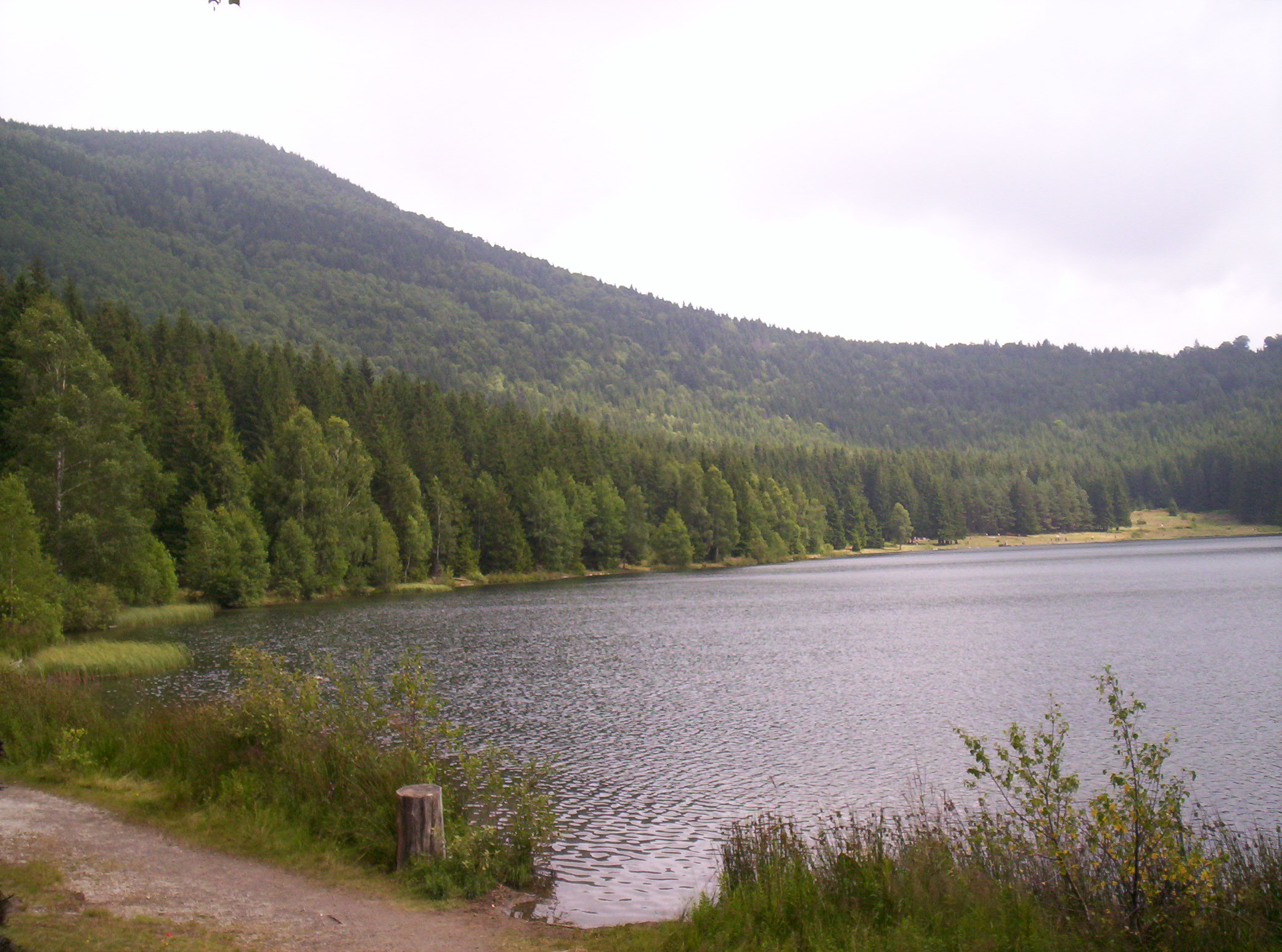 Az erdélyi Szent Anna-tó – photo taken by uploader User:Csanády in 2006.